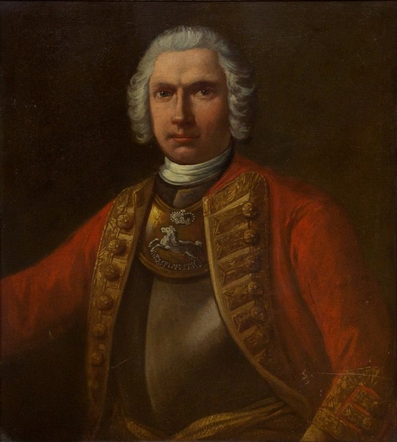 Porträt des hannoverschen Offiziers und späteren Generalmajorss Heinrich Bernhard von Sydow als Kapitän, 1749